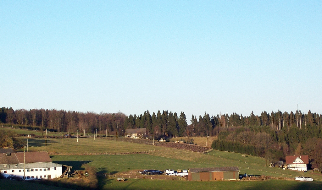 Schmallenberg-Herschede (Germany)